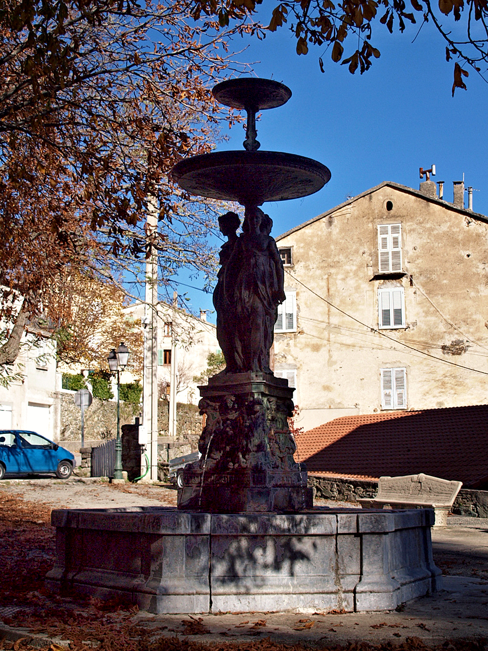 Vezzani (Corse) - Fontaine des Trois Grâces datée de 1867 (reprise à l'Inventaire général du patrimoine culturel - Mérimée IA2B001769)